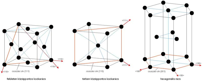 Csúszási síkok és irányok